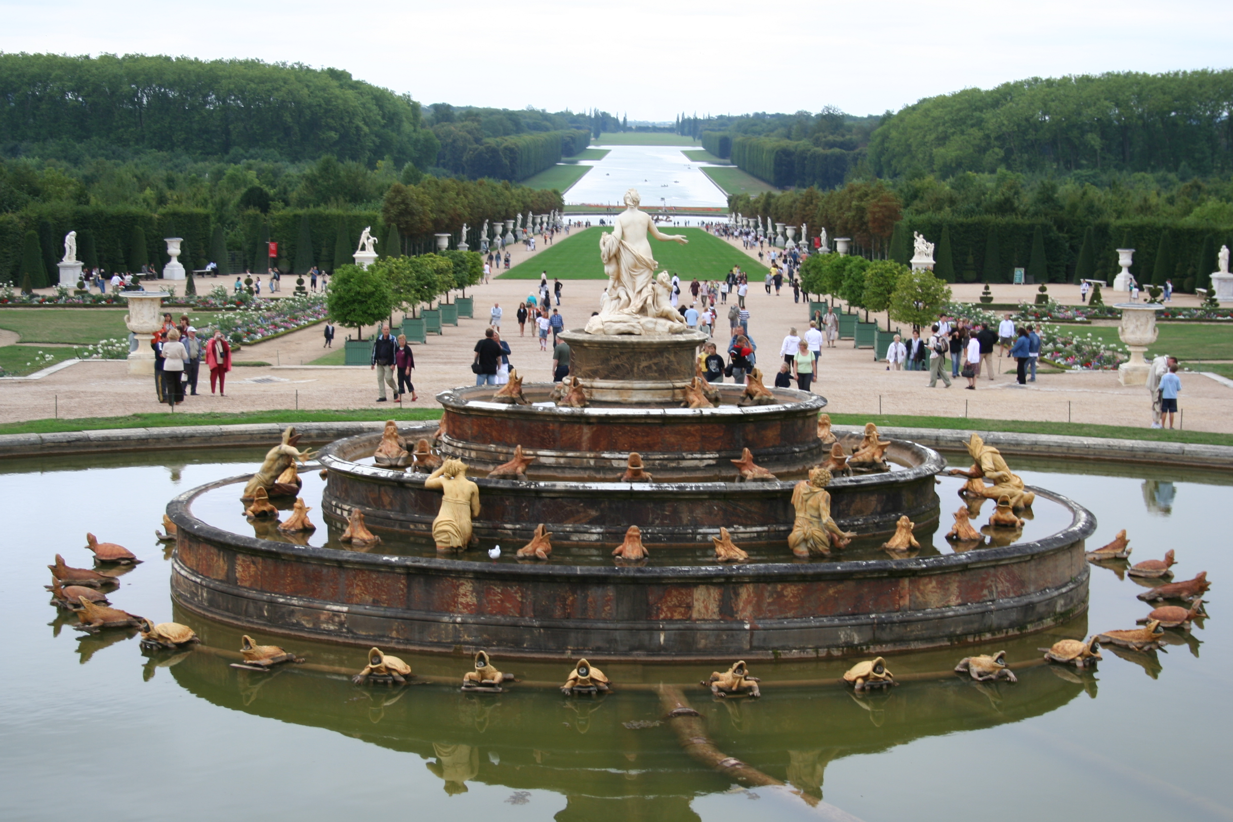 Balthazar Marsy et Gaspard Marsy: Bassin de Latone (XVIIe s.), Jardins du château de Versailles, France.